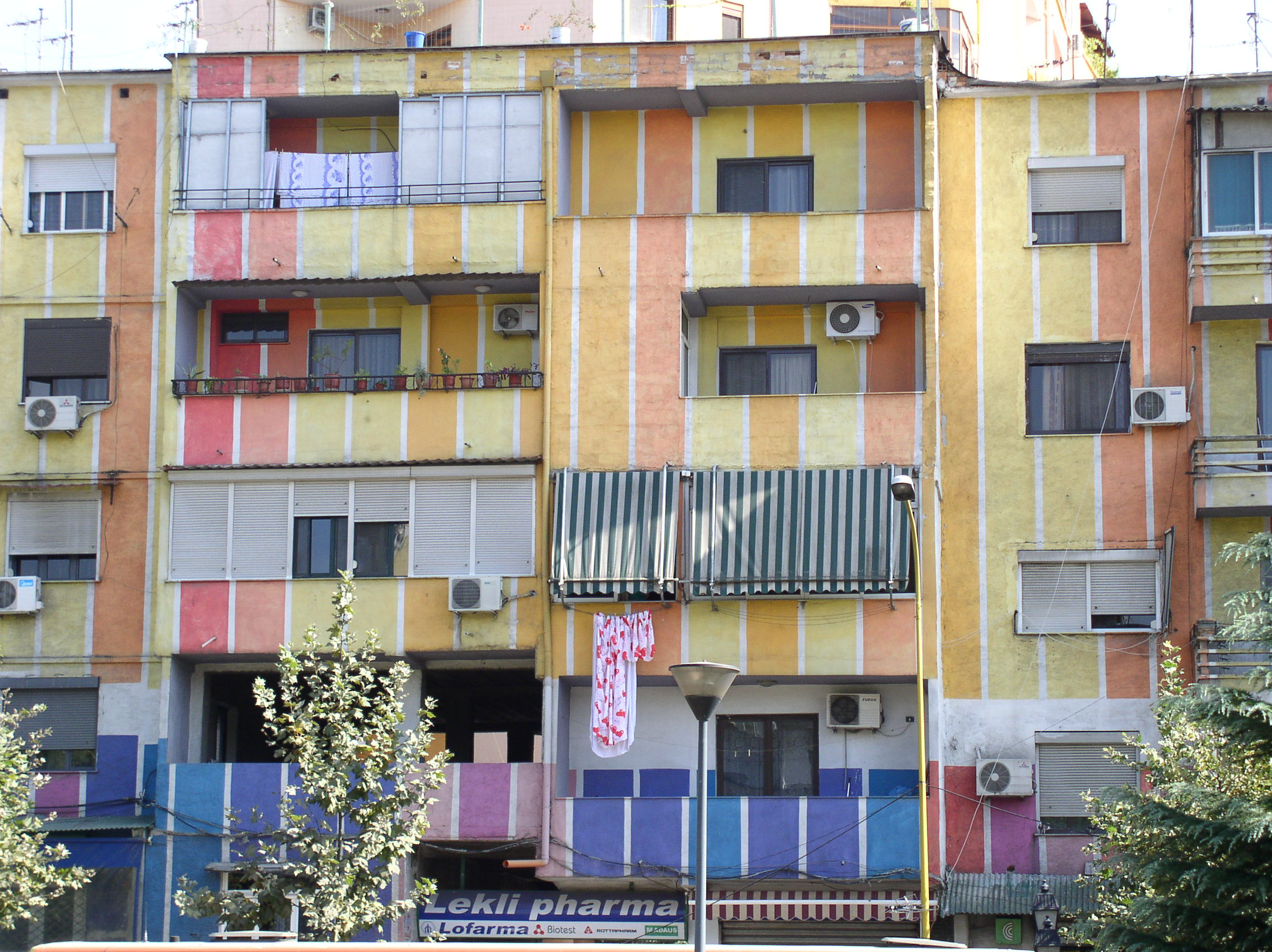 Fenomen vedrih boja u Tirani, bright colors in Tirana